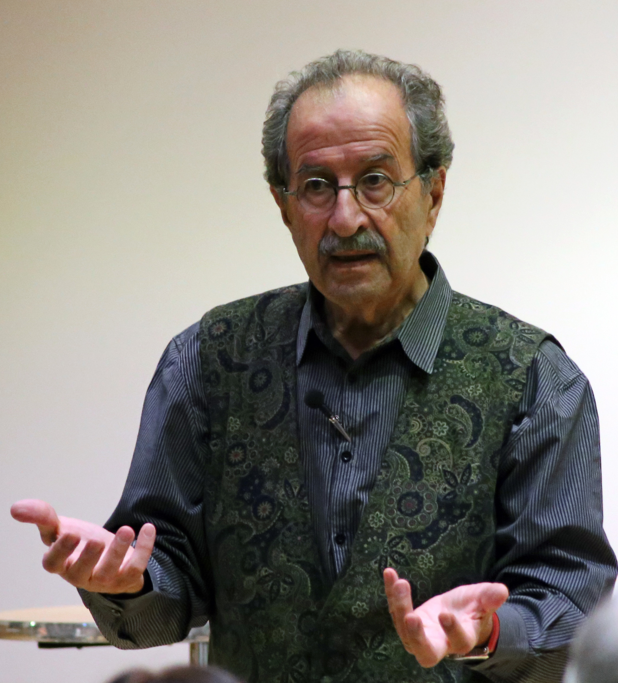 Rafik Schami in der Stadtbibliothek Nordhausen